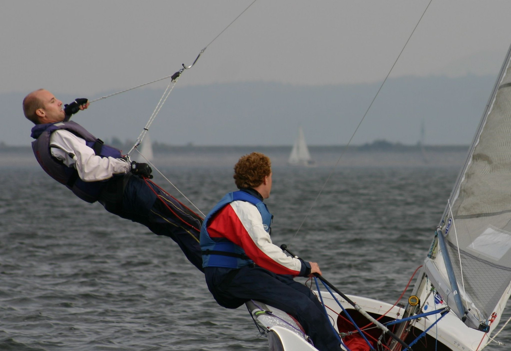 505er auf dem Großen Brombachsee, Bayern. Florian Lautenschläger im Trapez, Steuermann Michael Daisenberger.